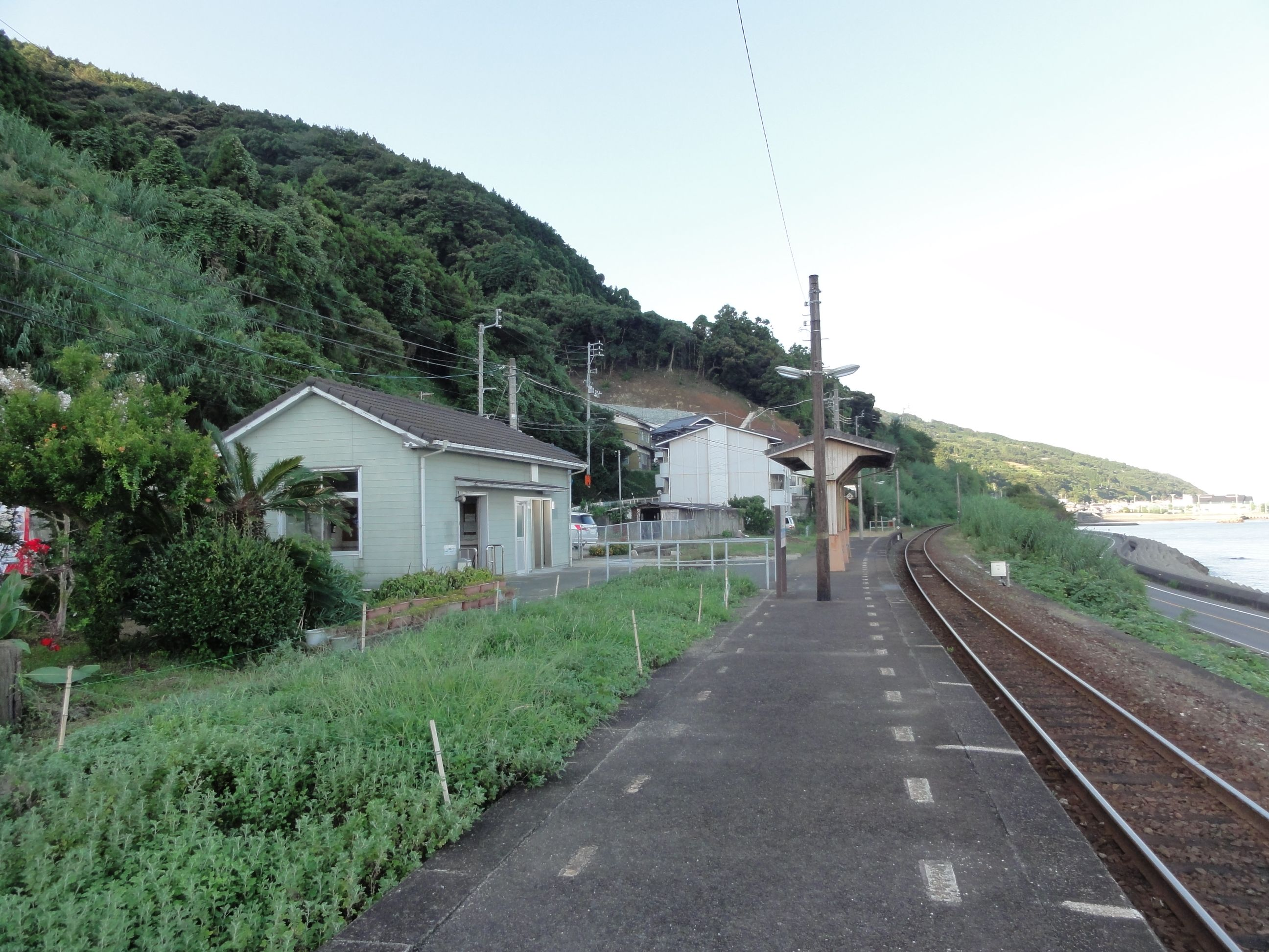 下灘駅ホーム